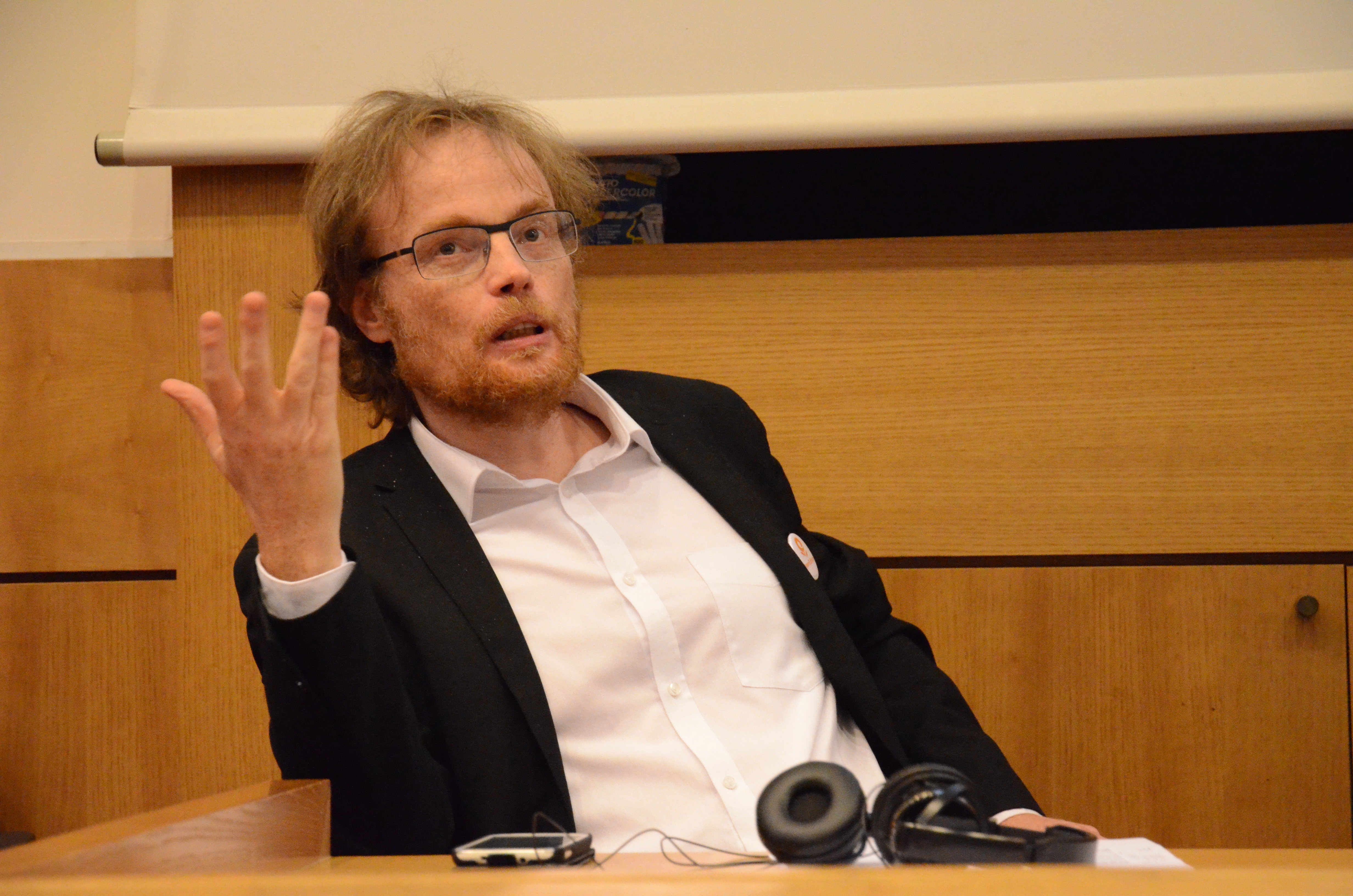 Photographie de Marin Dacos lors d'une intervention